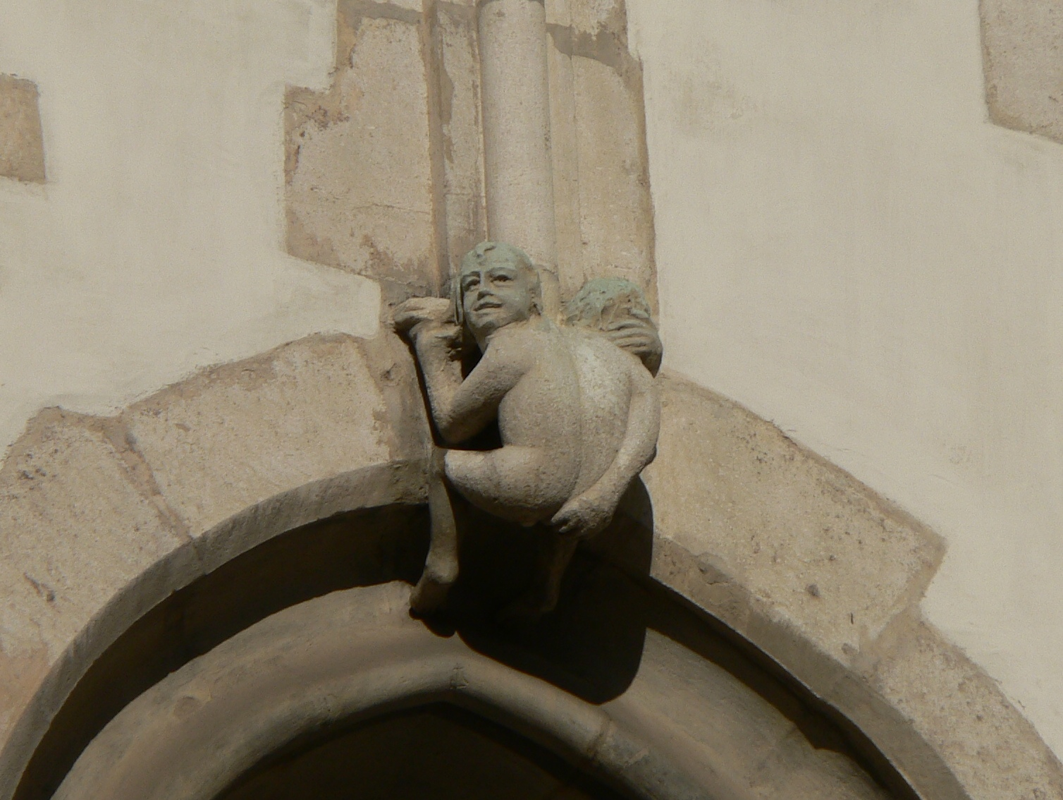 Kostel svatého Jakuba (Brno) - drolerie zvaná Nehaňba